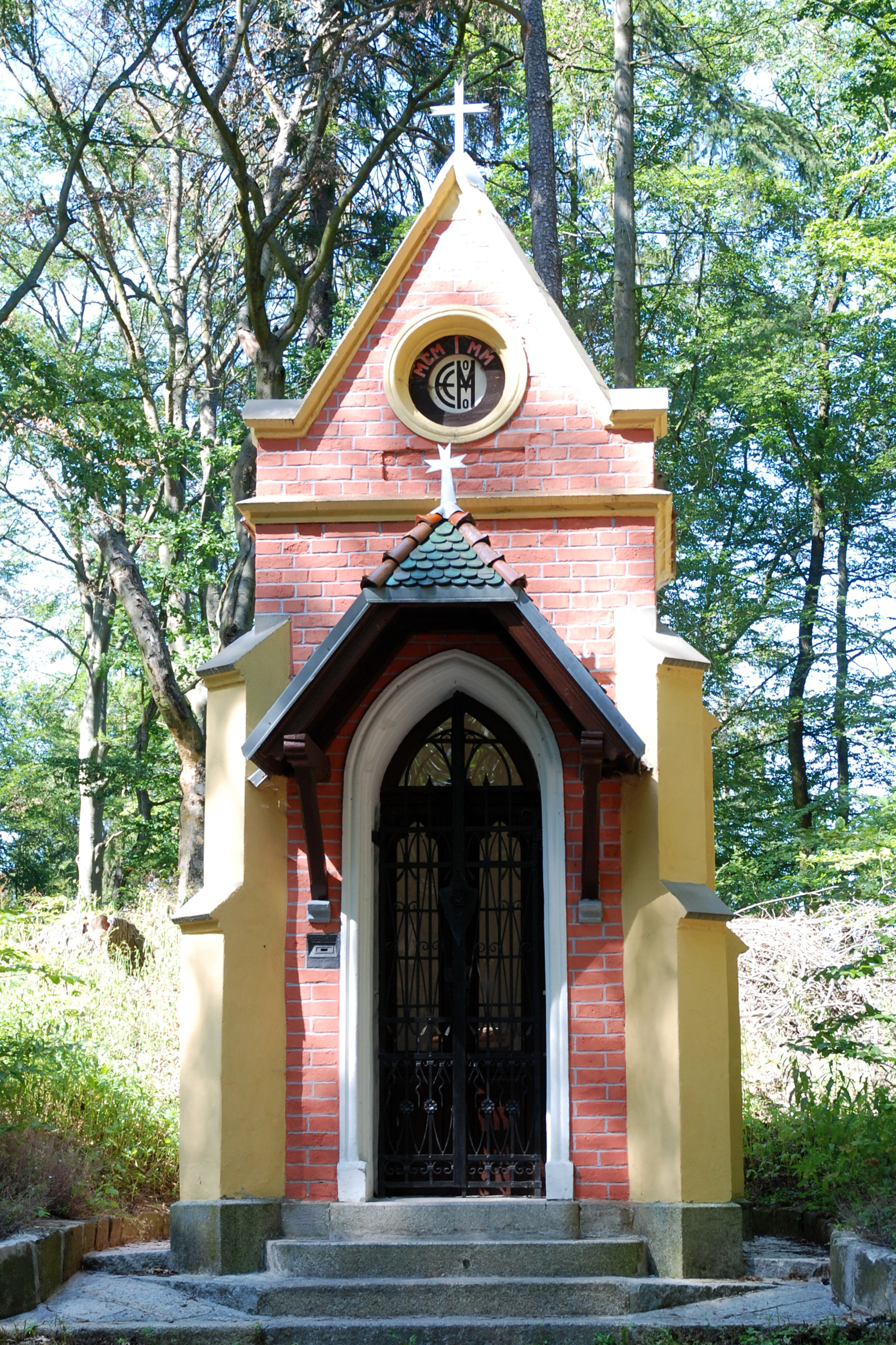 Kaple Ecce homo v karlovarských lázeňských lesích